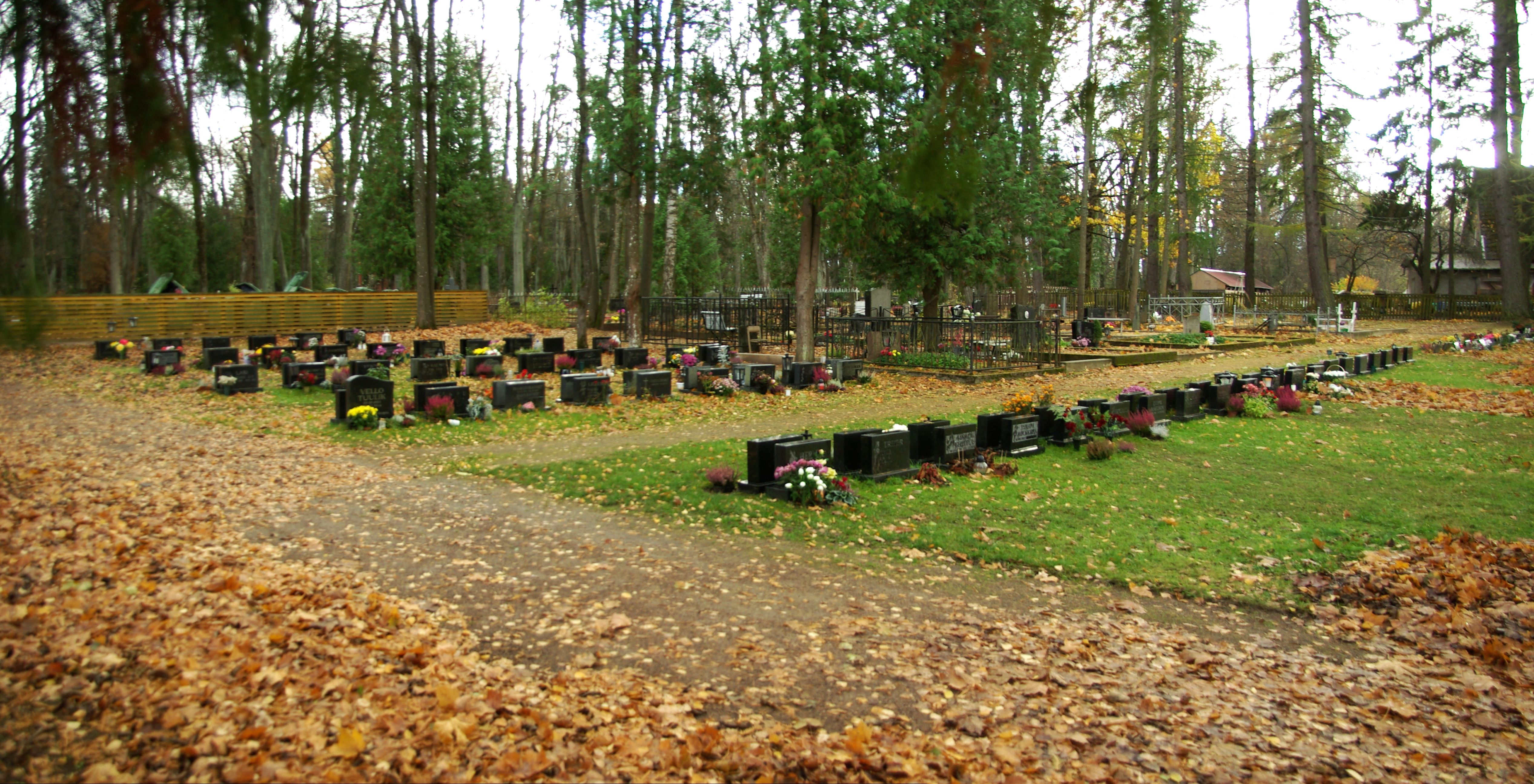 Tartu,Raadi kalmistu.Kalmistu paikneb Raadi kalmistu loodeosas.